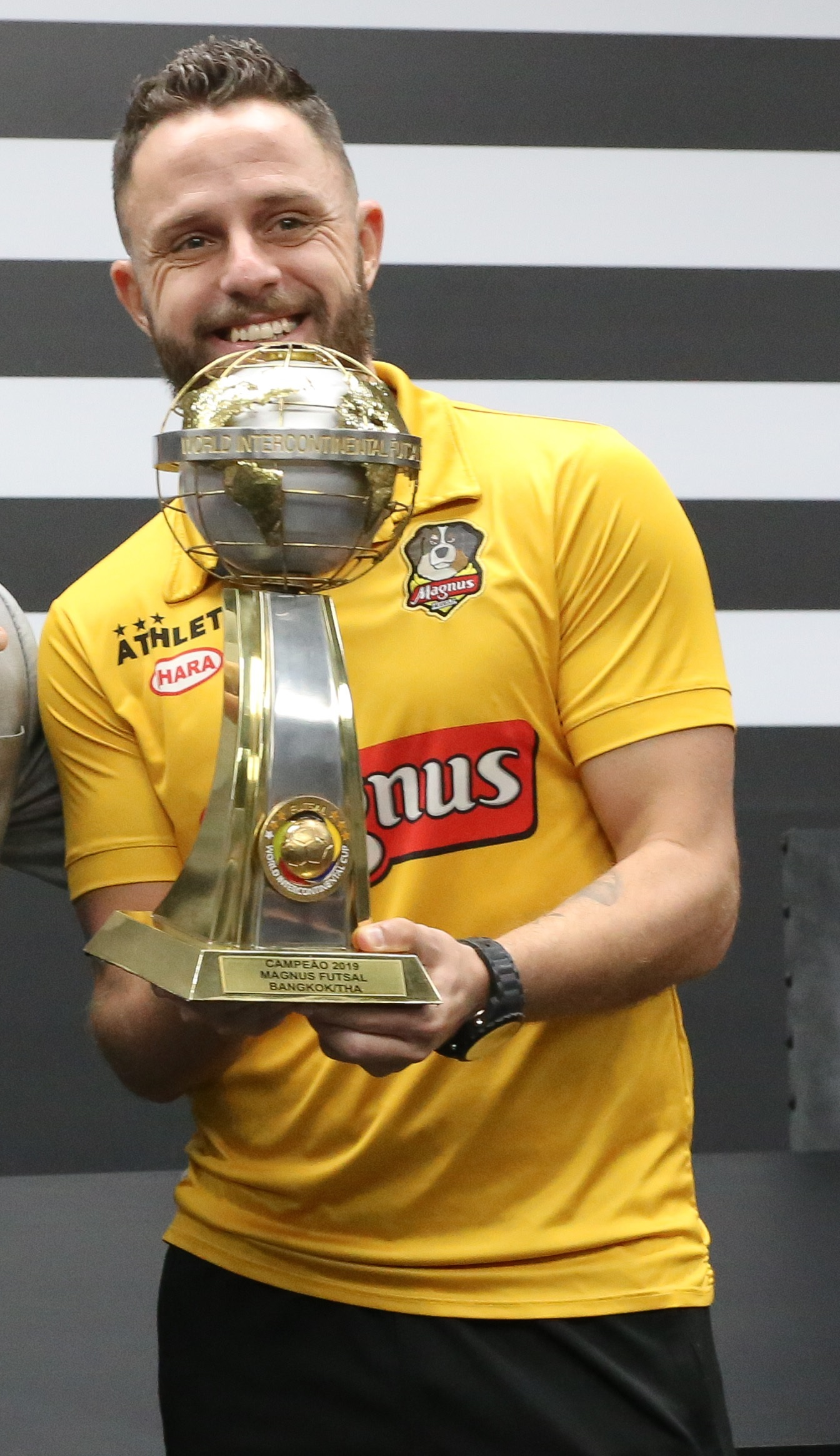 O Governador do Estado de São Paulo, João Doria, com o time Tricampeão Mundial de Futsal de Sorocaba. Local: São Paulo-SP. Data: 04/102019 Foto: Governo do Estado de São Paulo